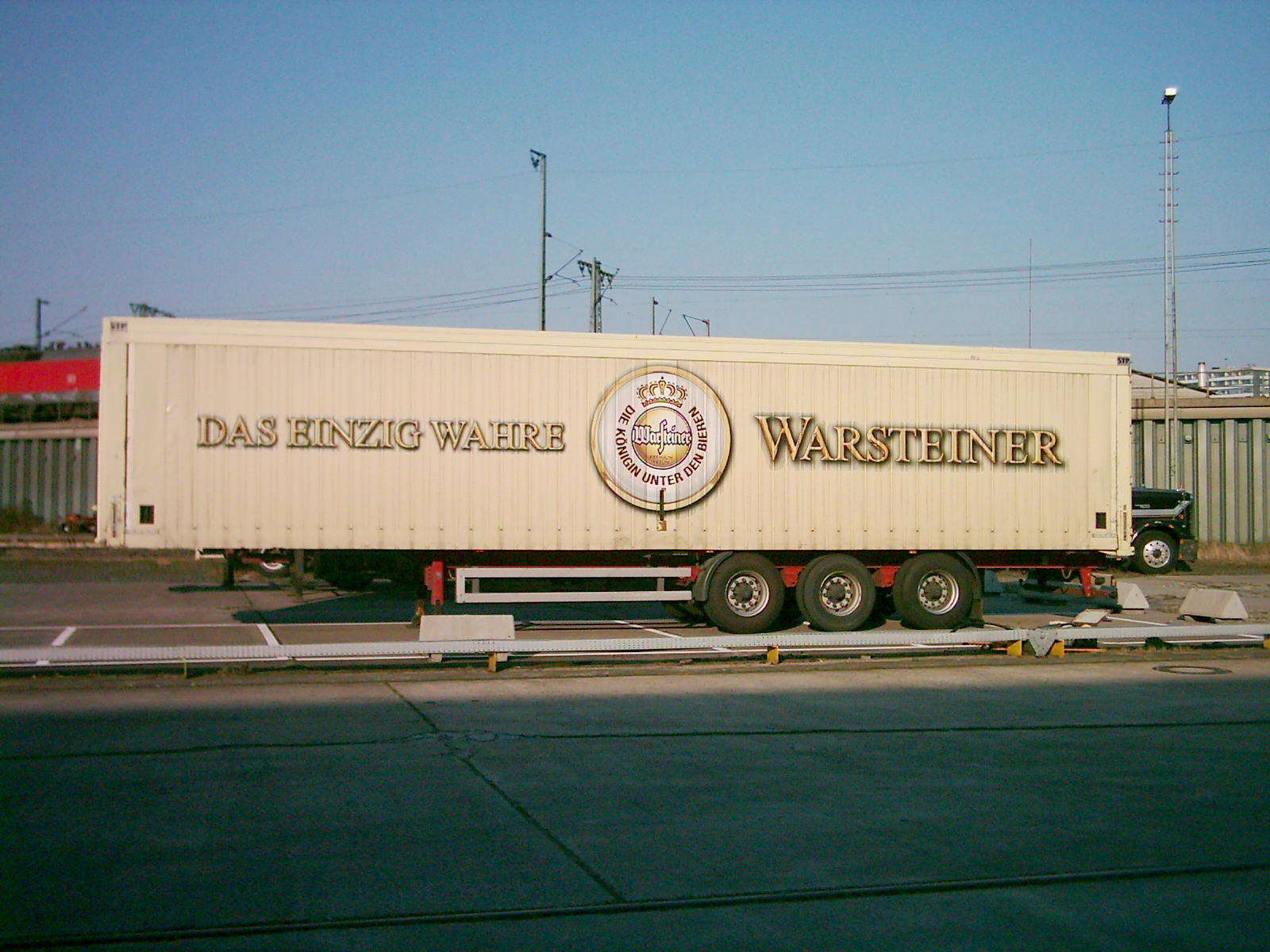 Anhänger der Warsteiner Brauerei